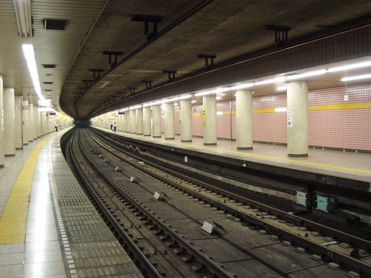 有楽町線新富町駅ホーム